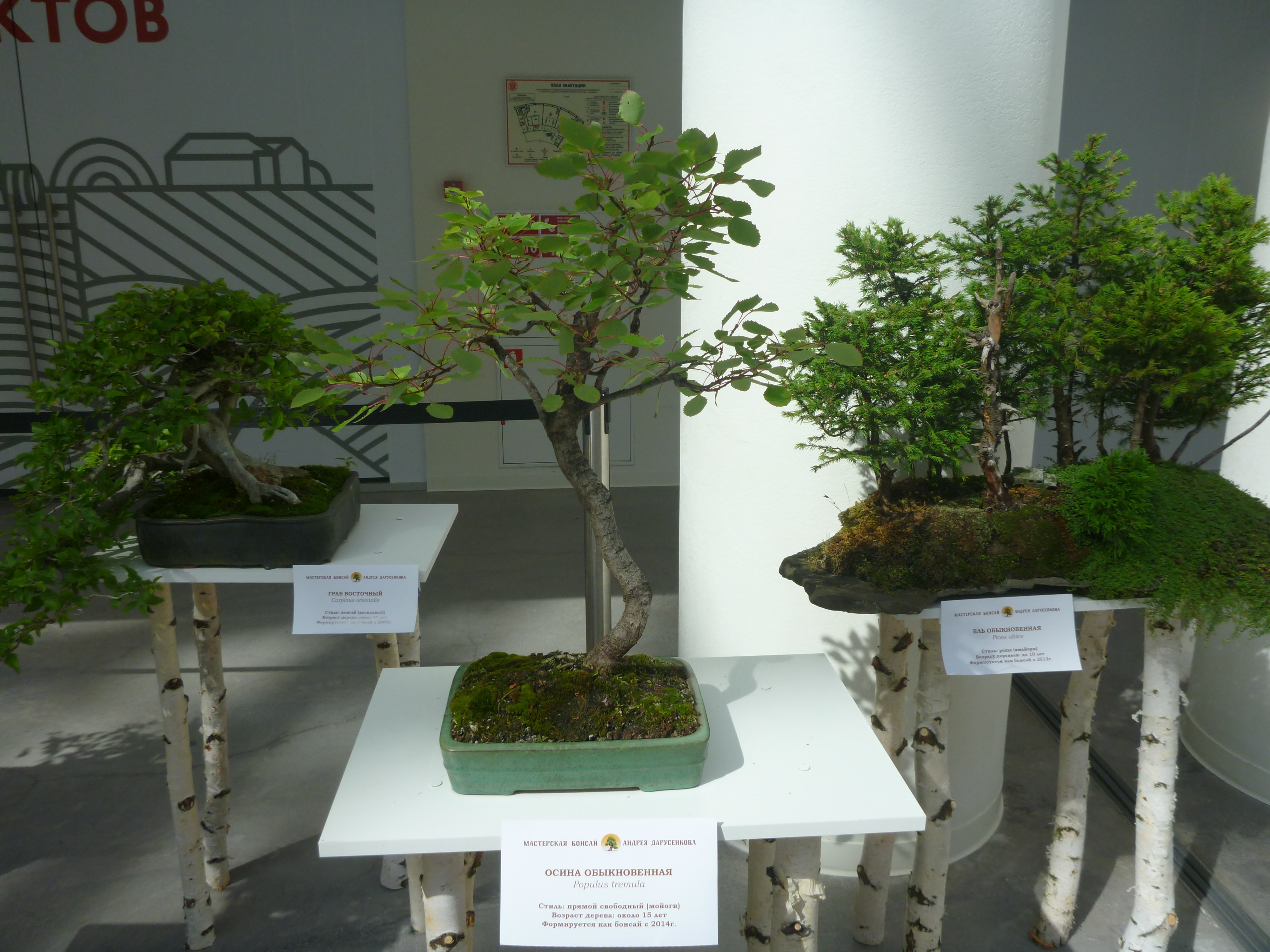 Осина обыкновенная в форме бонсай в Ельцин-центре, 2019 год